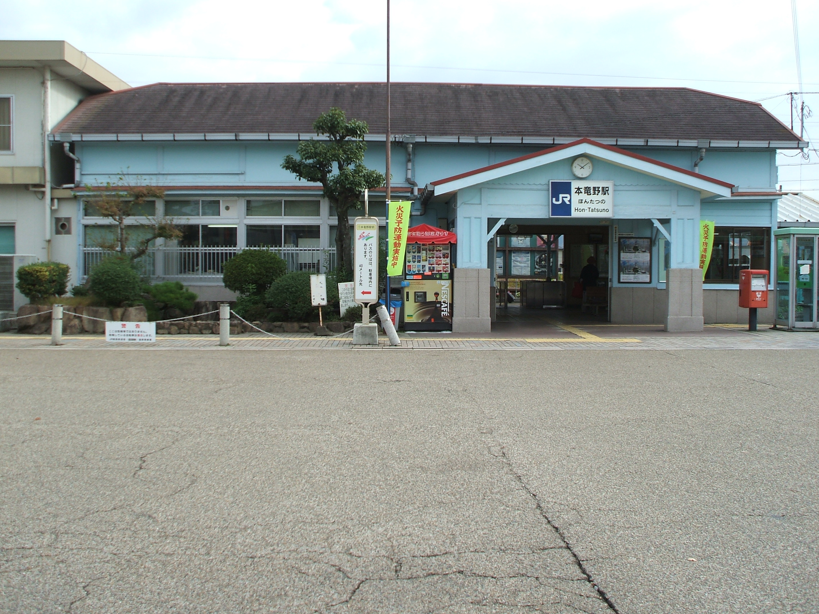 本竜野駅